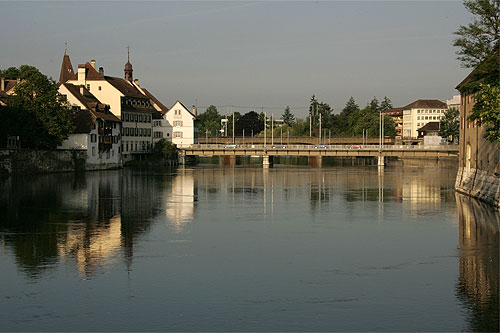 Solothurn: Wengibrücke (Aare) Template:Le Wengibrücke de Soleure sur l'Aar